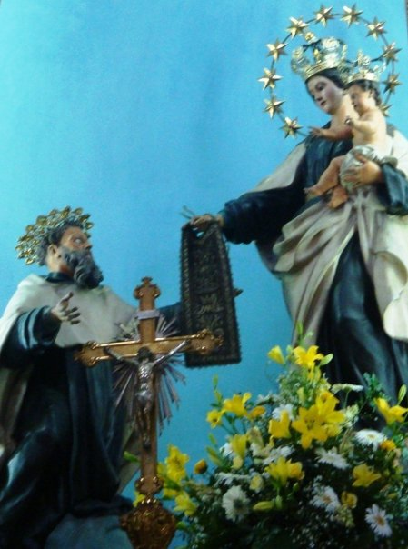 Statua della Madonna del Carmelo e di San Simone Stock (Altare Maggiore Chiesa del Carmine di Messina)